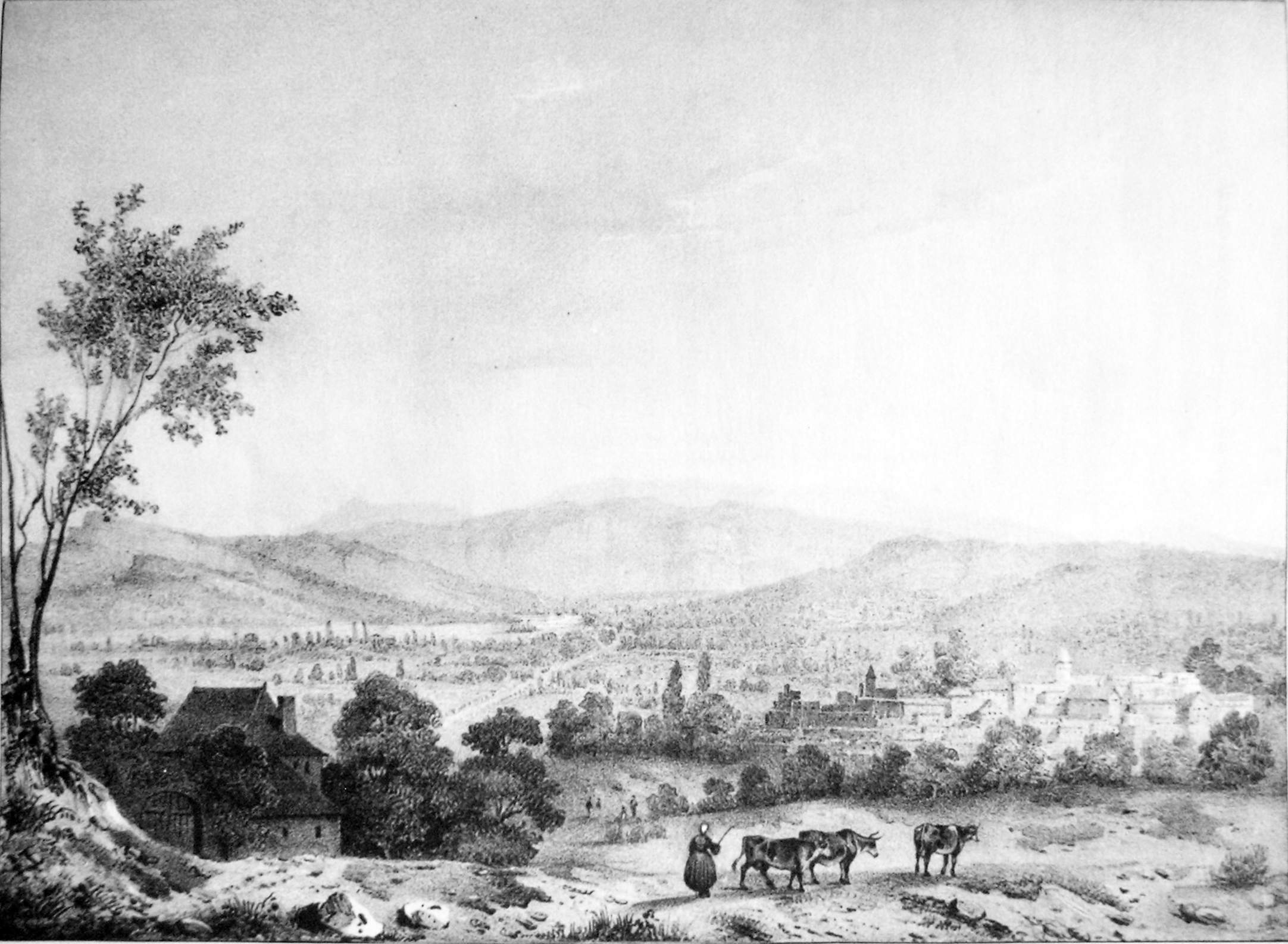 Plaine d'Aoste ATTENTION ! Ce facsimilé est réalisé en applicant des alterations avec un logiciel graphique à une copie numérique, obtenue à partir d'une prise de photo faite par un non-professionnel. Elle pourrait ne pas être parfaitement réussie.